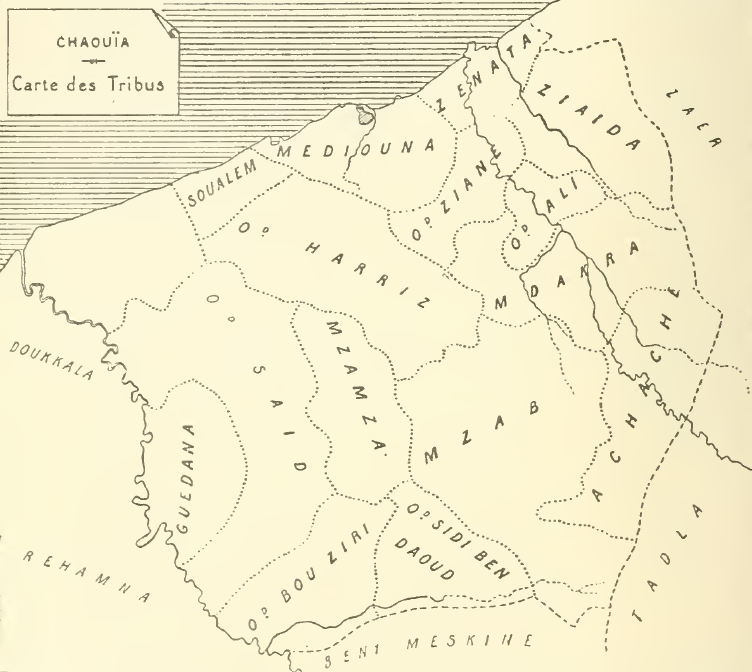 Carte des territoires des différentes tribus de la chaouïa circa 1915